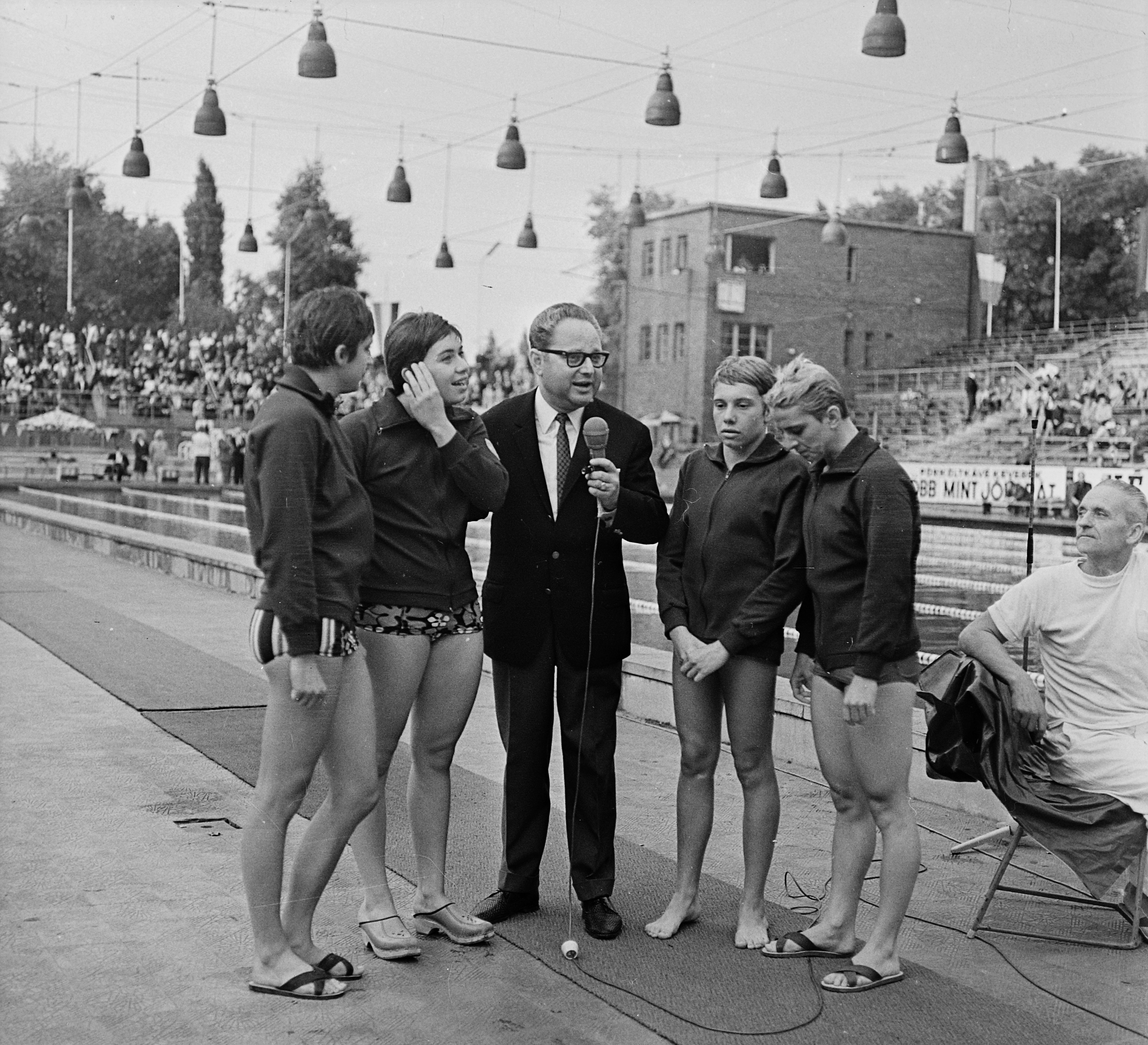 Hajós Alfréd Nemzeti Sportuszoda. A többszörös Európa csúcstartó 4x100-as magyar gyorsváltó tagjai, Patóh Magda, Gyarmati Andrea, Kovács Edit és Turóczy Judit Szőnyi János sportriporterrel. Location: Hungary, Budapest, Margit Islands Tags: swimming, reporter, celebrity Title: Hajós Alfréd Nemzeti Sportuszoda. A többszörös Európa csúcstartó 4x100-as magyar gyorsváltó tagjai, Patóh Magda, Gyarmati Andrea, Kovács Edit és Turóczy Judit Szőnyi János sportriporterrel.